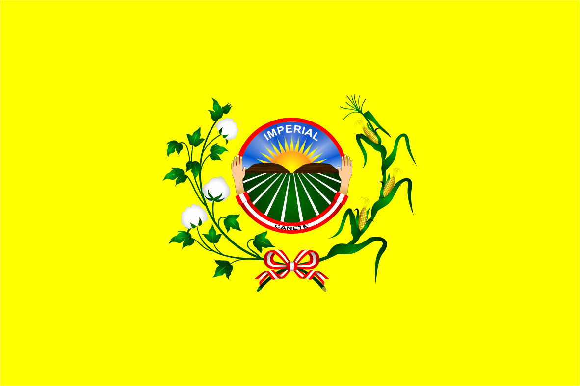 Distrito de Imperial - Provincia de Cañete - Región Lima